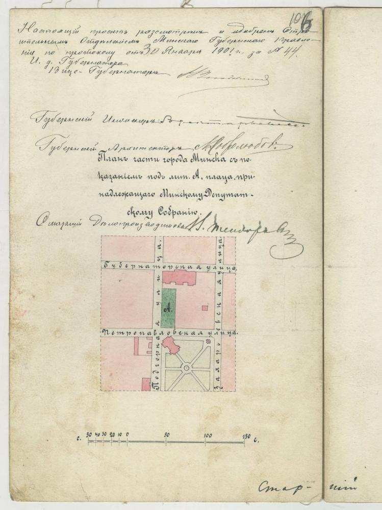 Беларуская (тарашкевіца): Менск (Miensk), Новае Места (Novaje Miesta): рог вуліц Падгорнай (vulica Padhornaja) і Дамініканскай (vulica Daminikanskaja). Шляхецкі клюб